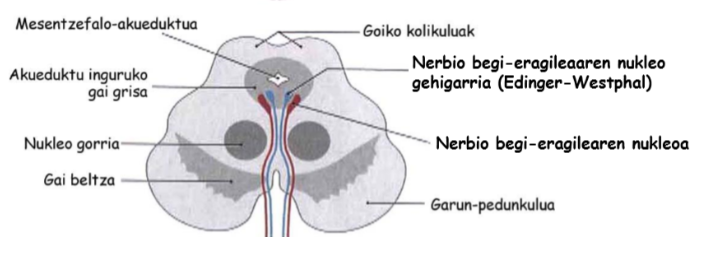 Nukleo okulomotorraren erlazioak